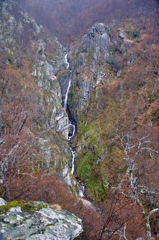 Поглед кон беловишка река